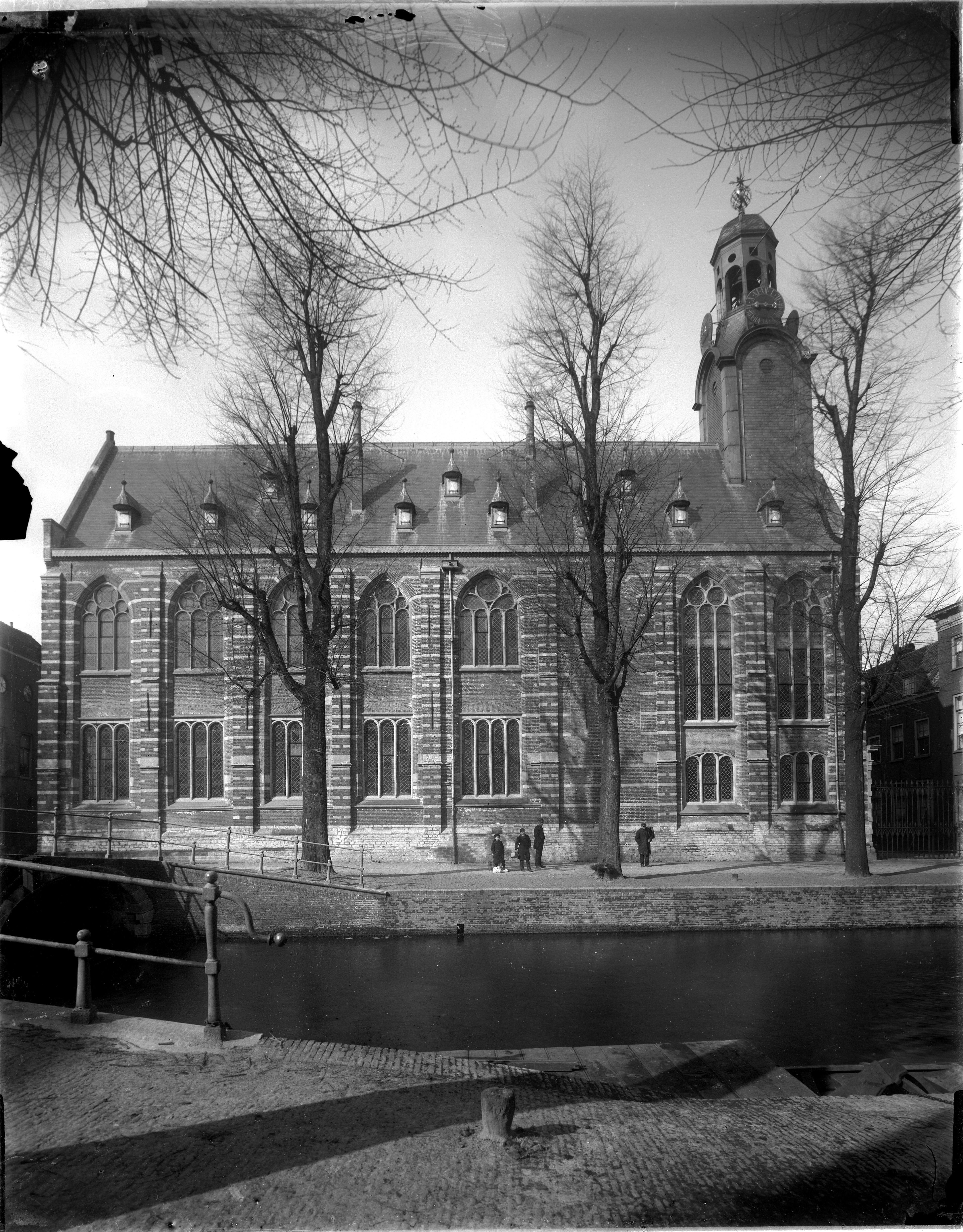 Academiegebouw Rapenburg 73, gezien van de oostzijde van het Rapenburg naar het westen.